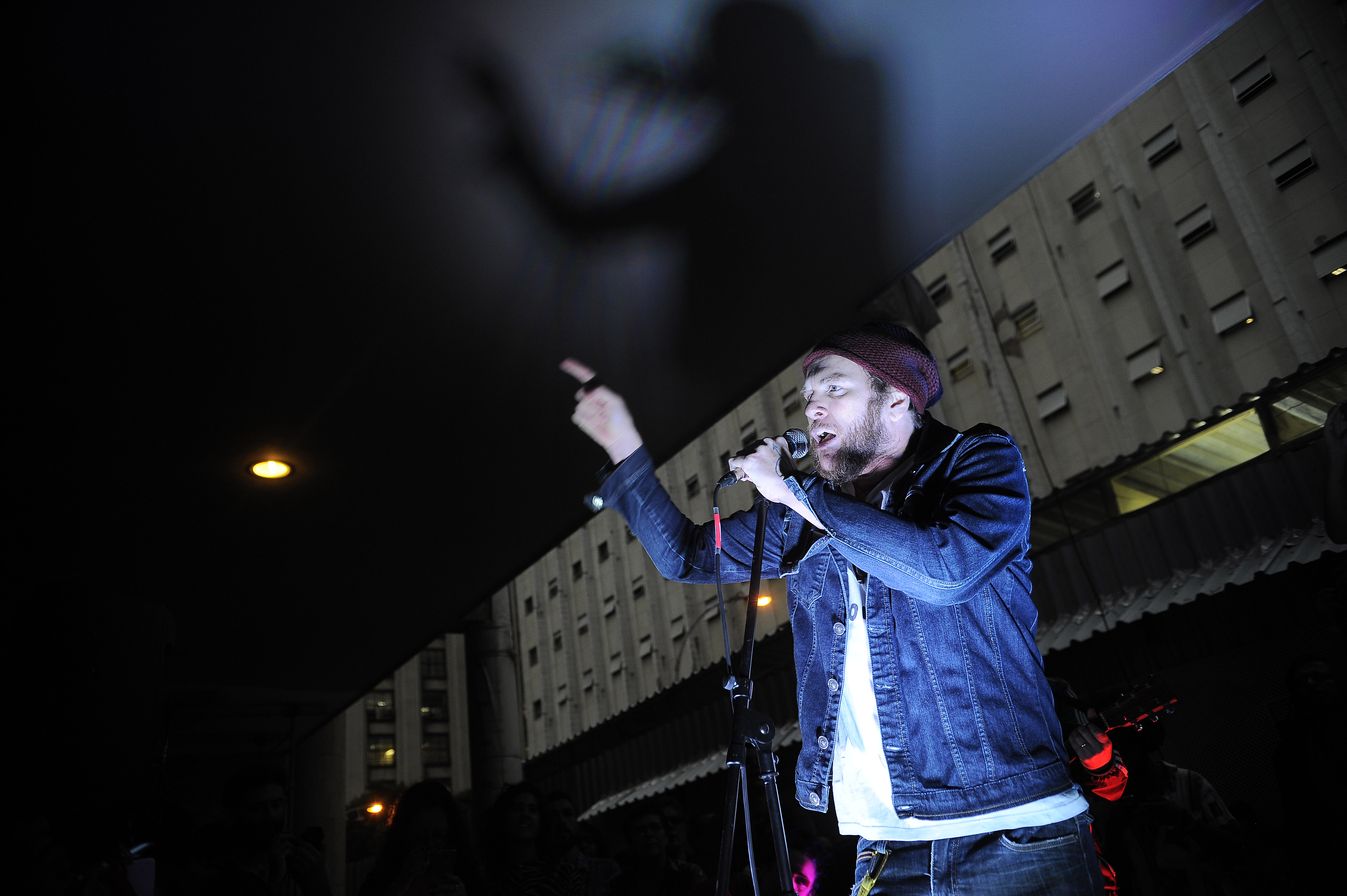 Rio de Janeiro - O músico Otto canta em show para manifestantes que ocupam o Edifício Gustavo Capanema, sede da Funarte contra mudanças no Ministério da Cultura (Fernando Frazão/Agência Brasil)